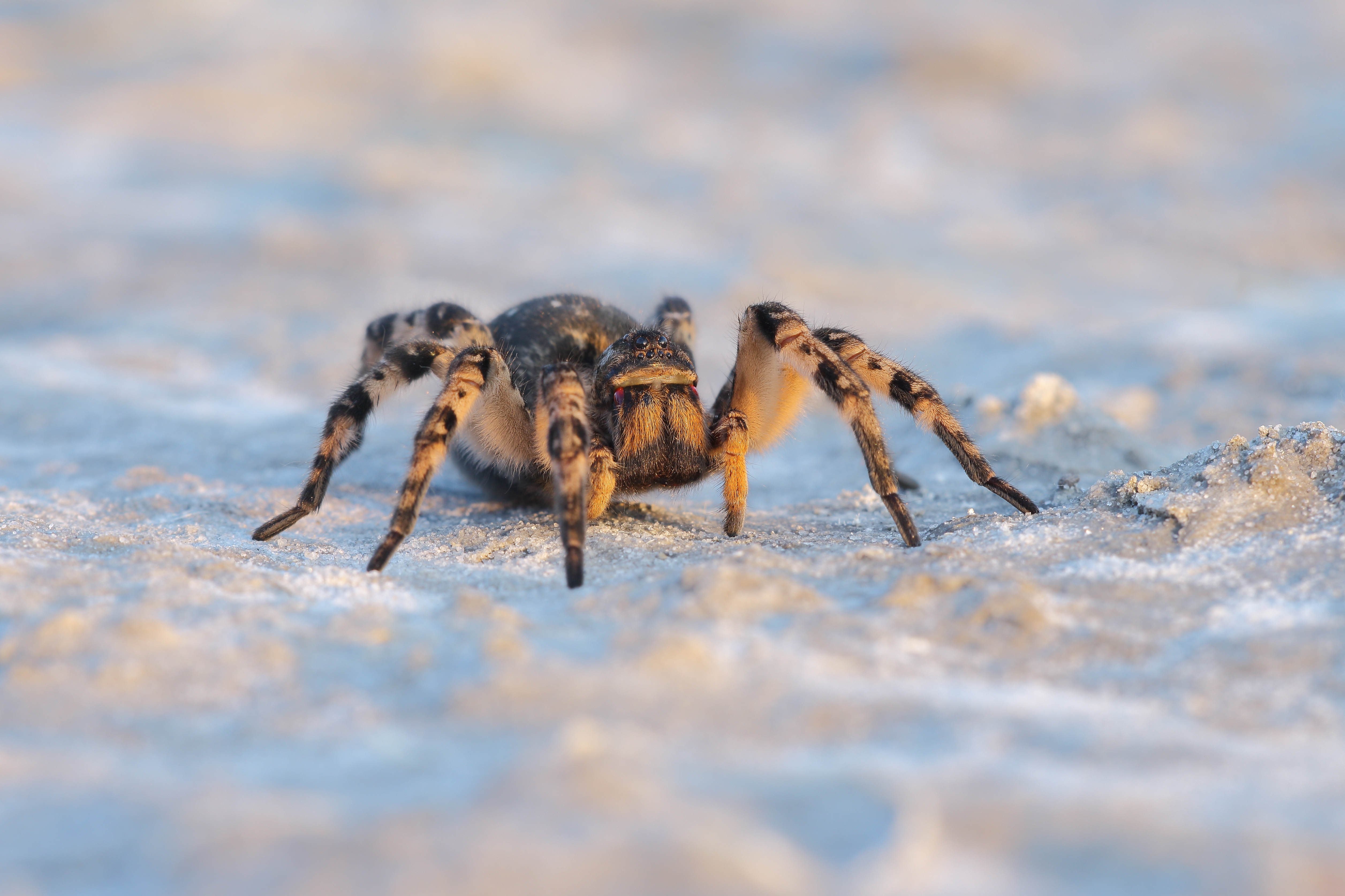 Солоний лиман, охоронна зона, Новомосковський р-н, між с. Новотроїцьке, Знаменівка